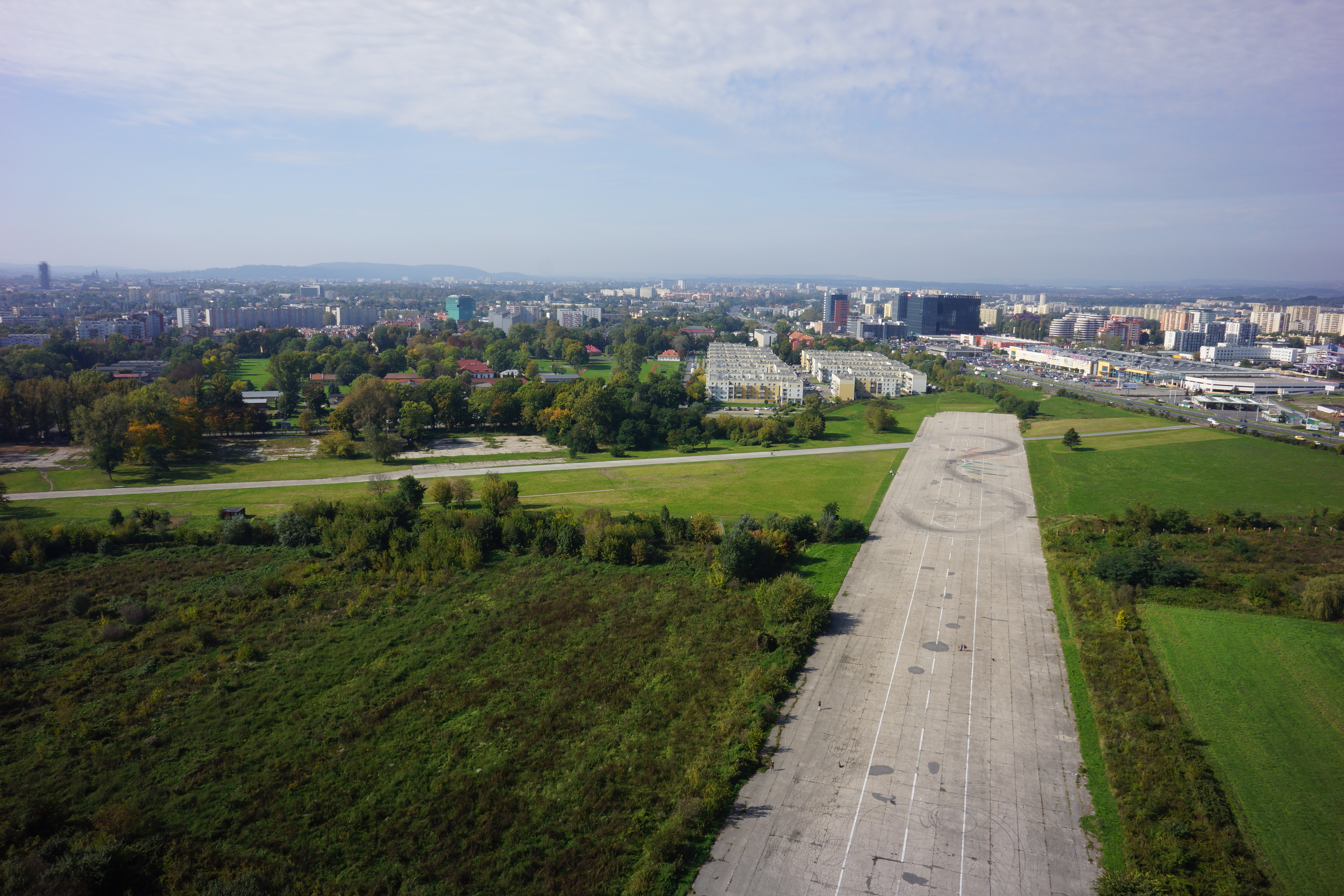 Kraków, zespół lotniska Rakowice-Czyżyny, 1912-1939